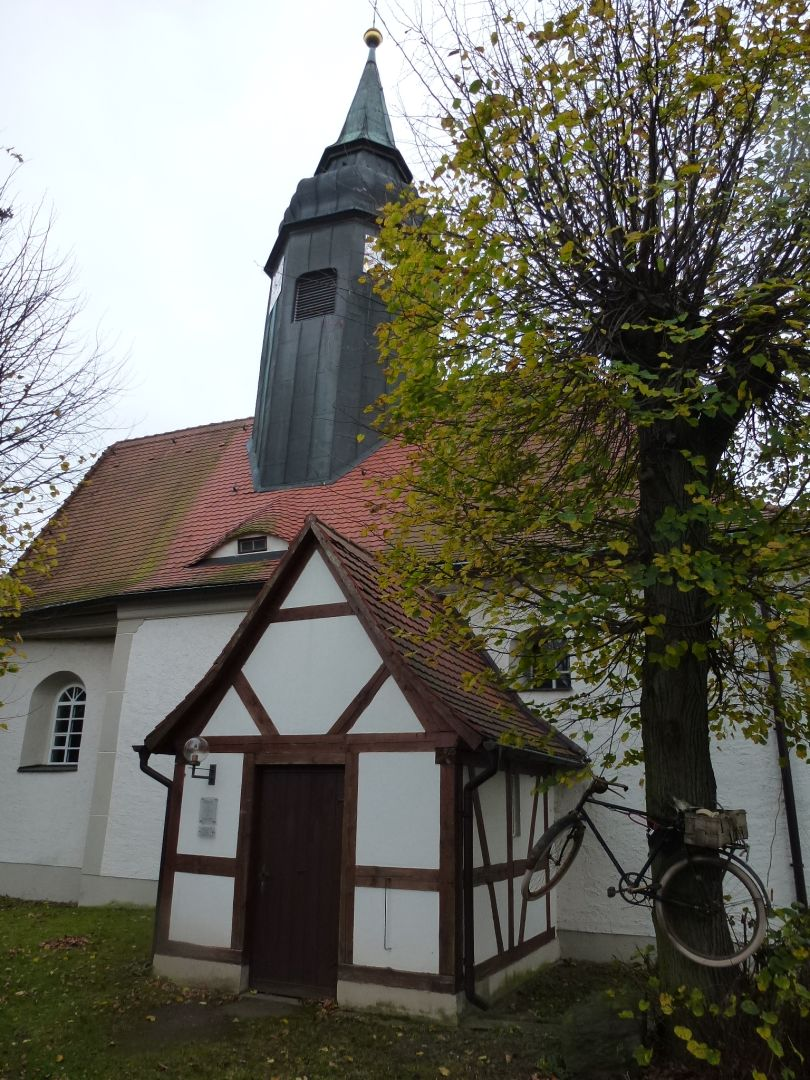 Radfahrerkirche in Erdmannshain